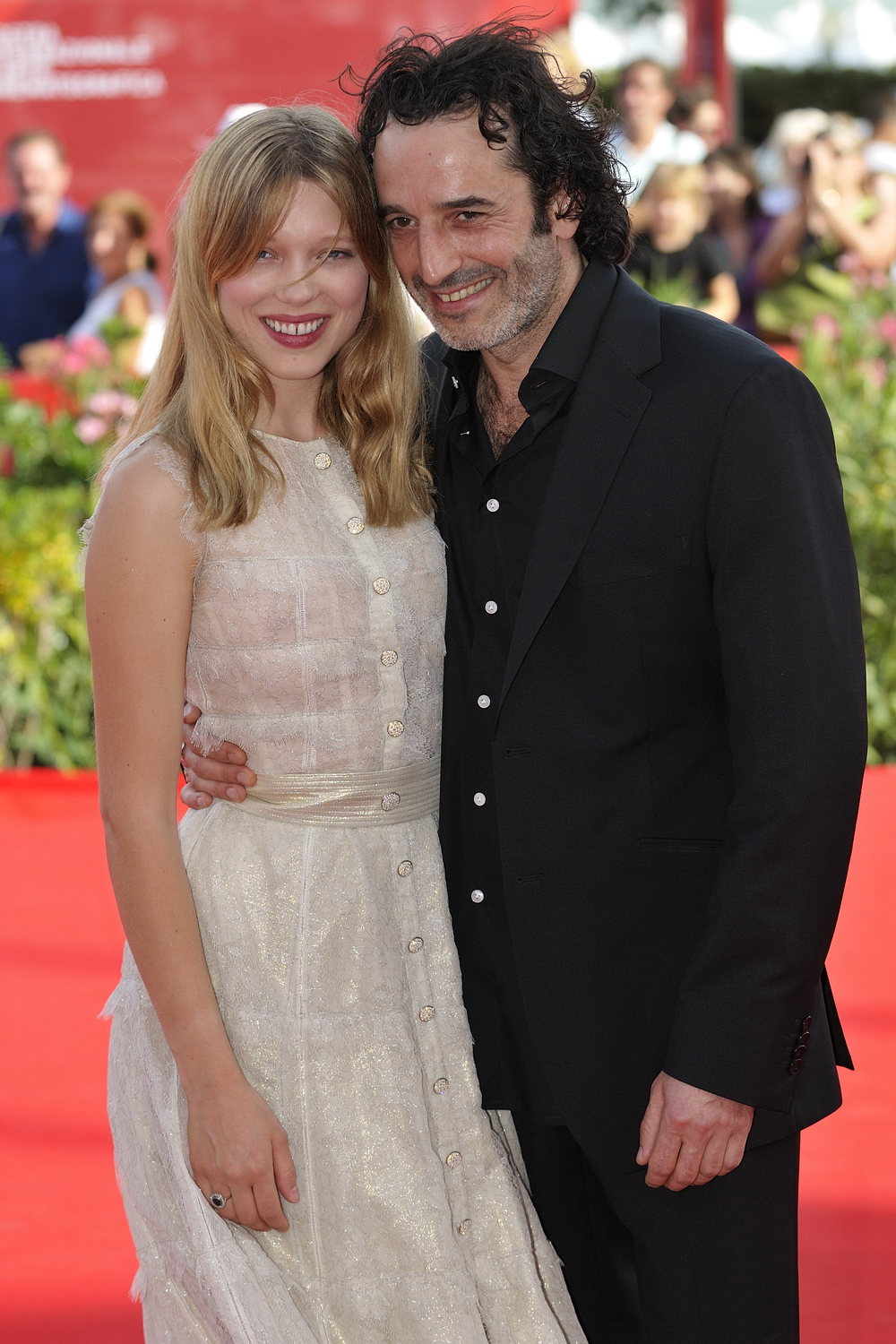 66ème Festival du Cinéma de Venise (Mostra), 3ème jour (04/09/2009) Photocall avec Léa Seydoux, Bruno Todeschini, Jessica Hausner (Réalisateur) pour le film : Lourdes